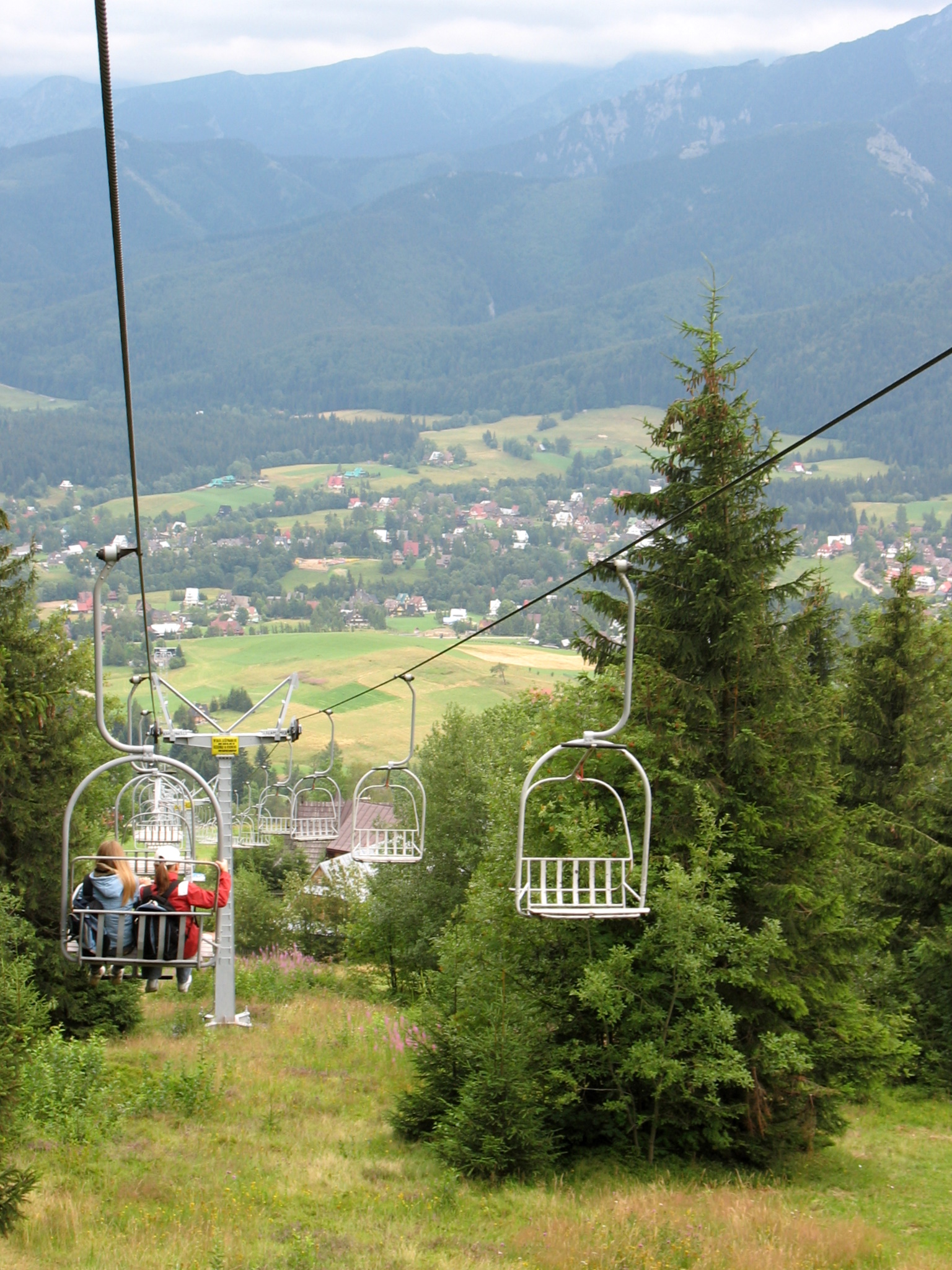 wyciąg krzesełkowy, Butorowy Wierch, Gubałówka, Zakopane, Tatry